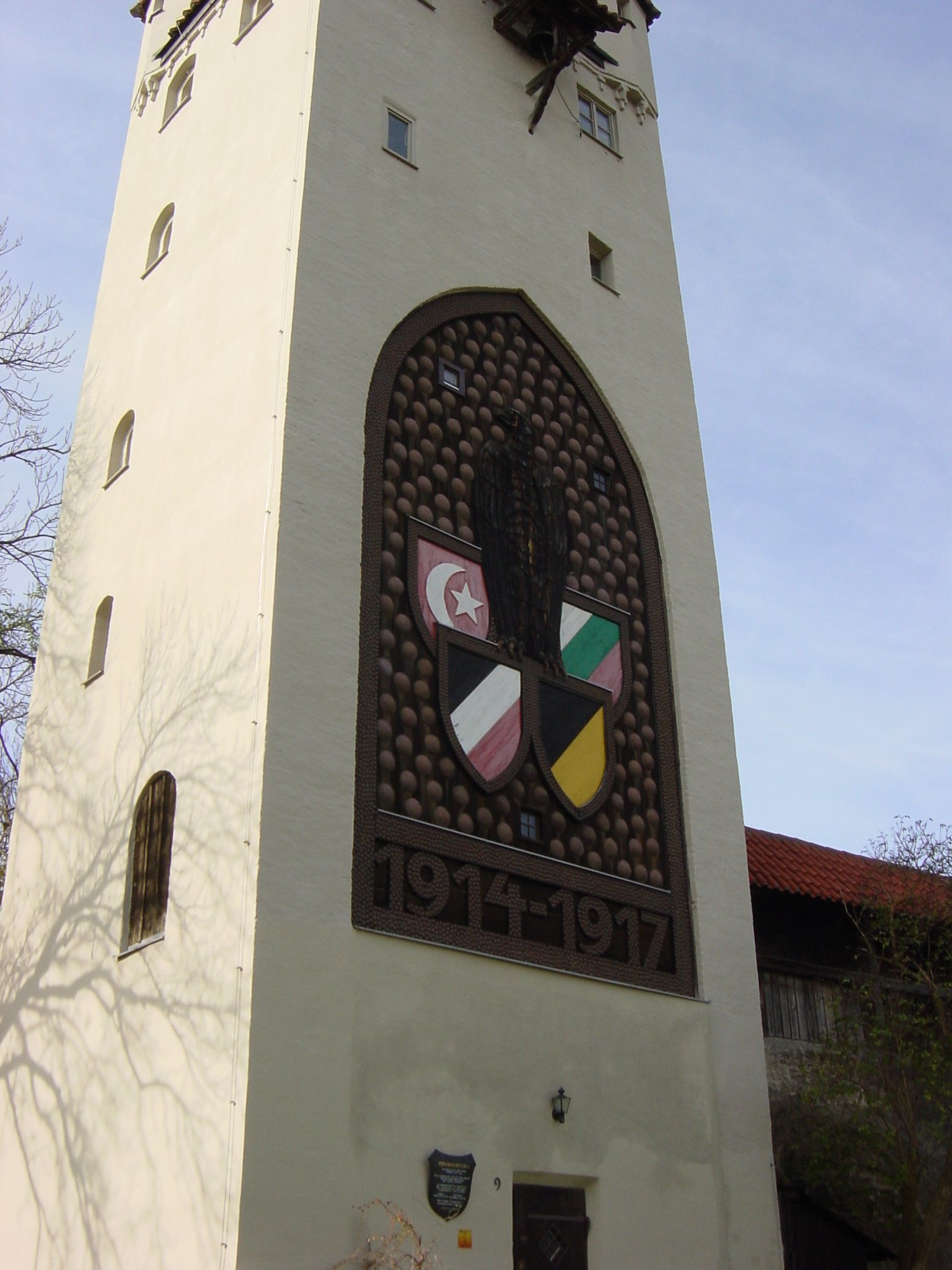 Wehrschild am Fünfknopfturm in Kaufbeuren, Bavaria, Germany selbt aufgenommen am 21.10.2005 (Volker Schaurich, DieAlraune)